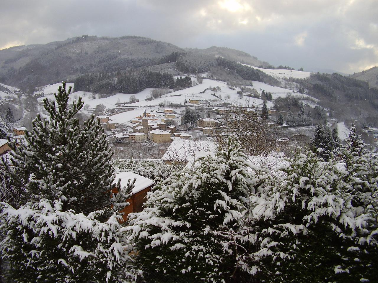 Photo du village de Lamure-sur-Azergues, dans le département du Rhône (France), prise le 26 novembre 2010.